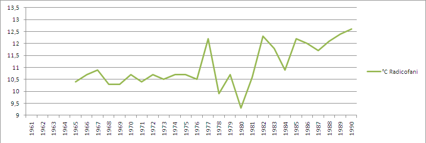 Stazione meteorologica di Radicofani: andamento della temperatura media annua dal 1961 al 1990.